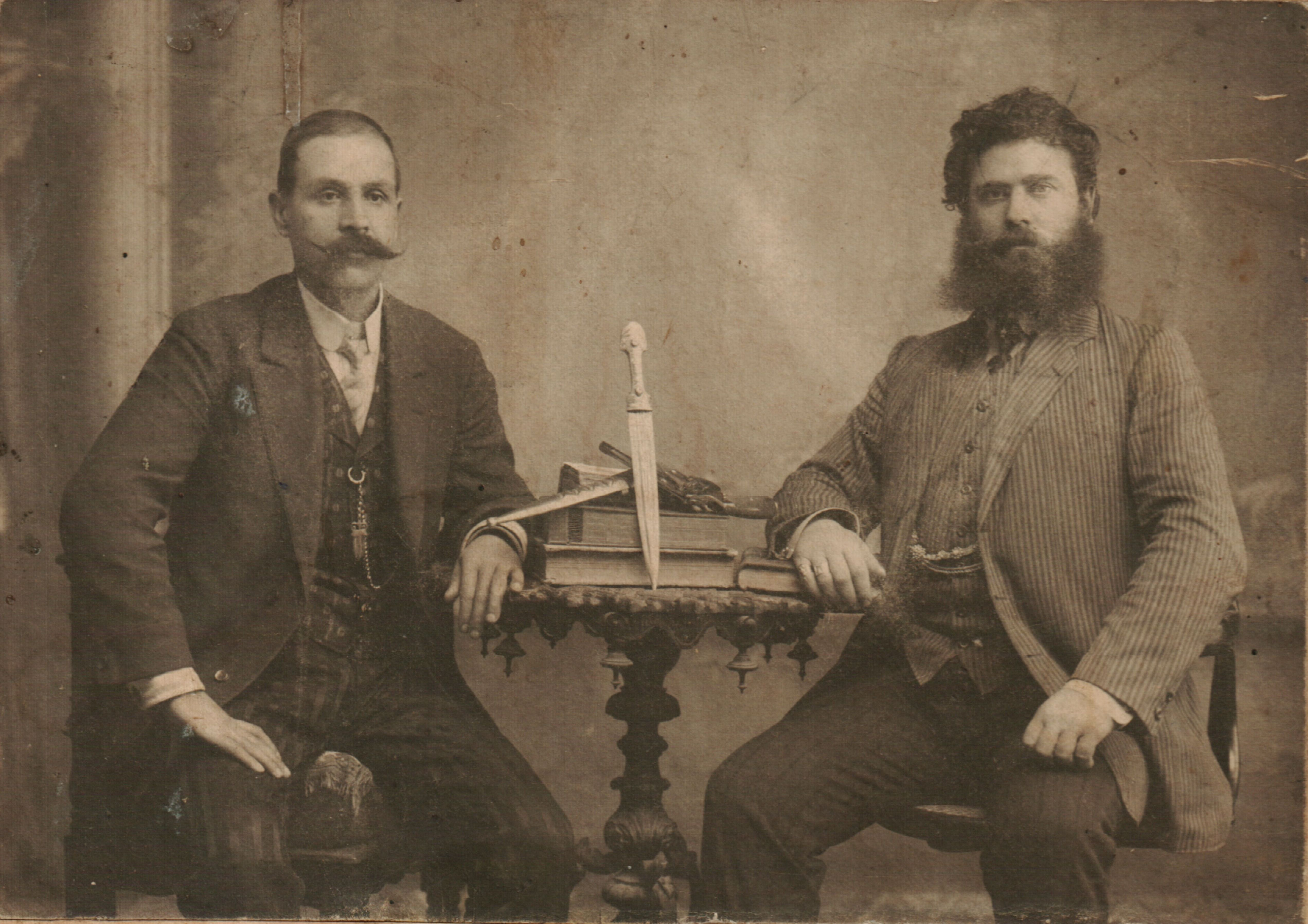 Снимка на Тане Николов и Петре Глухия.